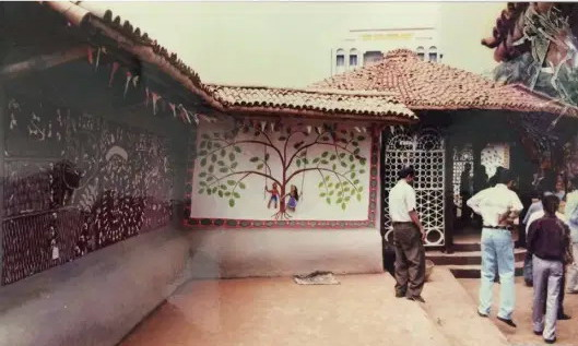 Sarguja-relief til Malerkunst i Indien